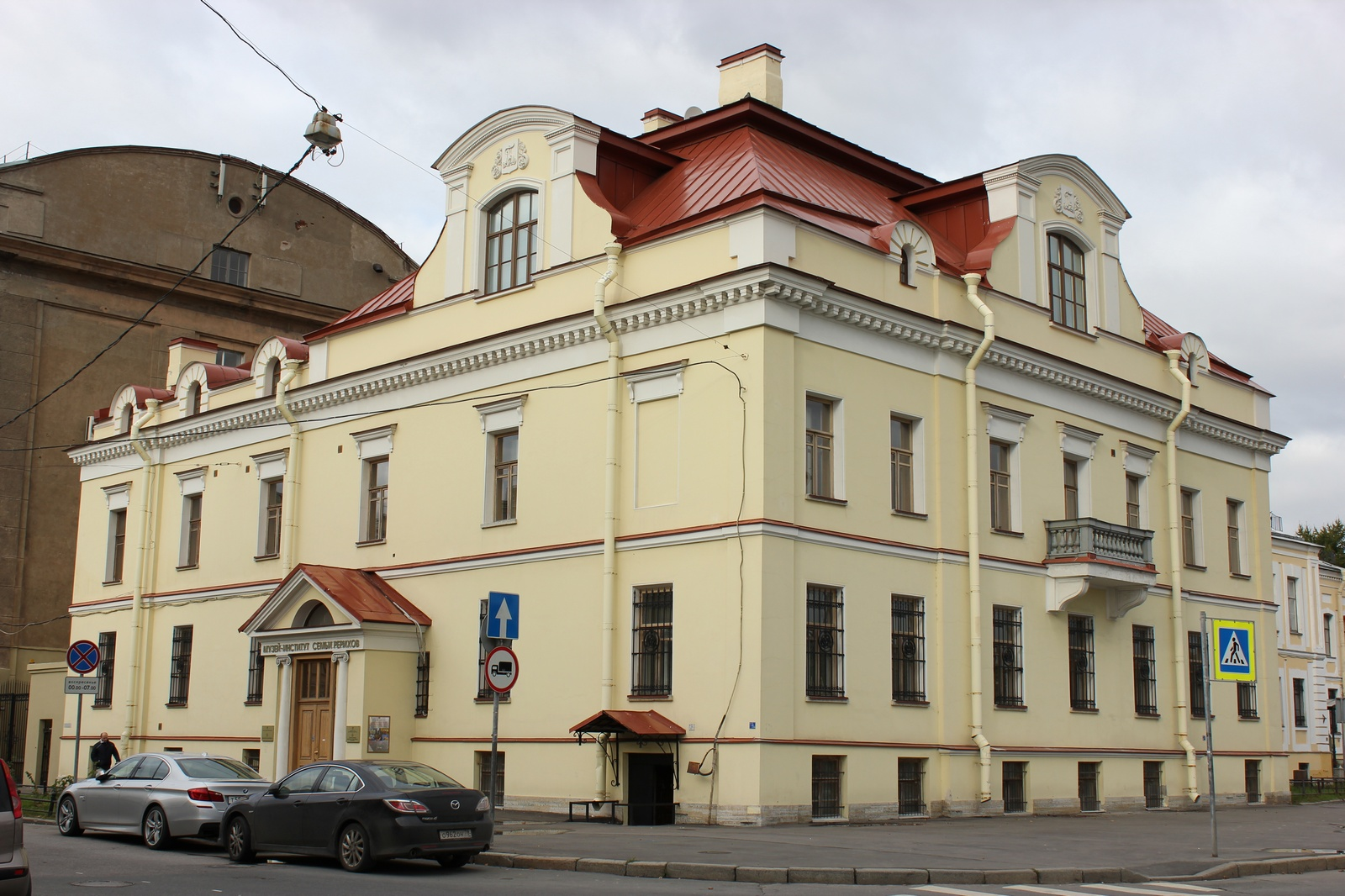 Дом Боткина М. П. (Санкт-Петербург и Лен.область, Санкт-Петербург, Лейтенанта Шмидта наб., 41, 18-я линия Васильевского острова, 1)